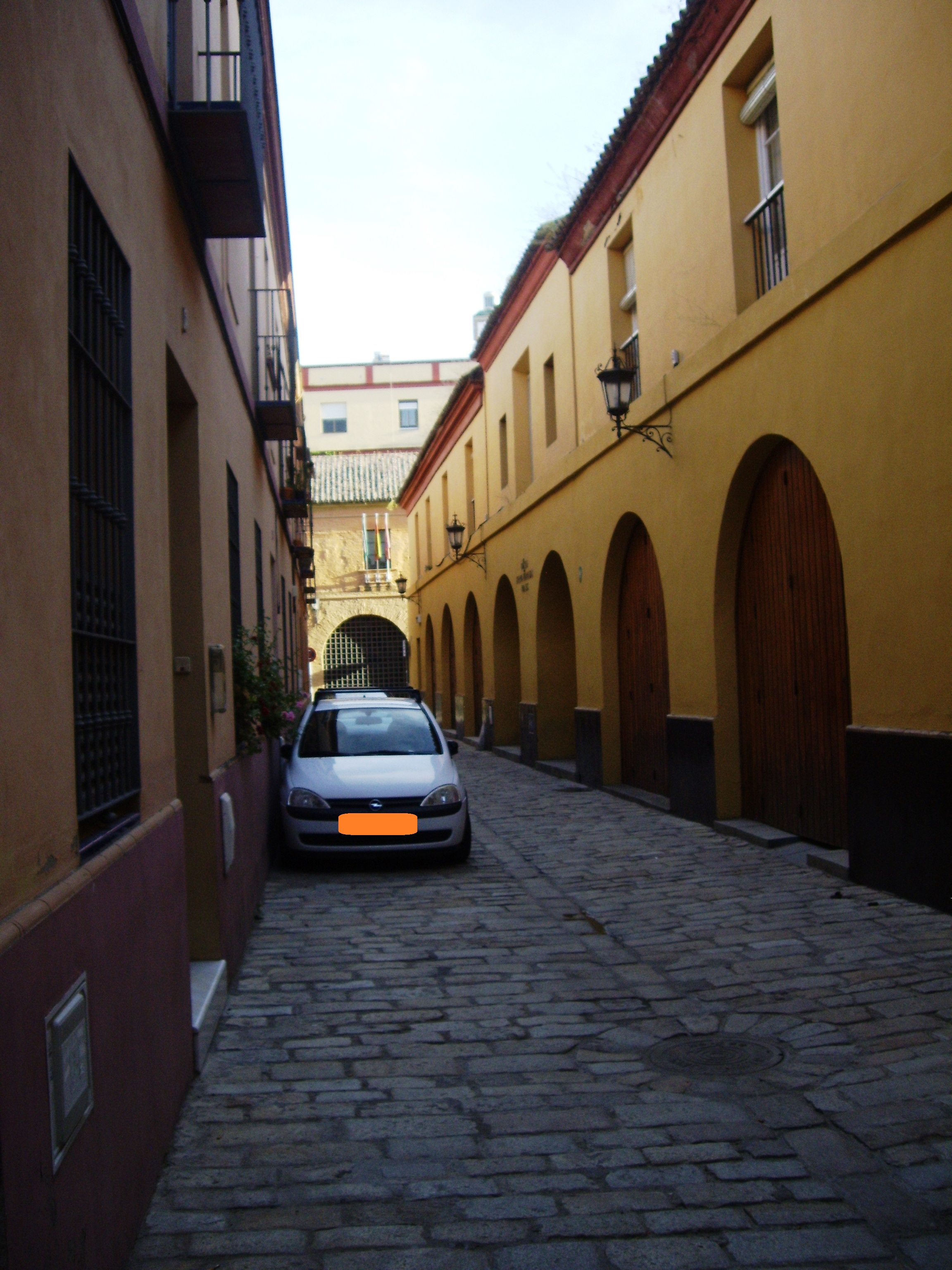 Interior de la Casa de la Moneda. Pueden notarse los hermosos arcos y las calles empedradas.